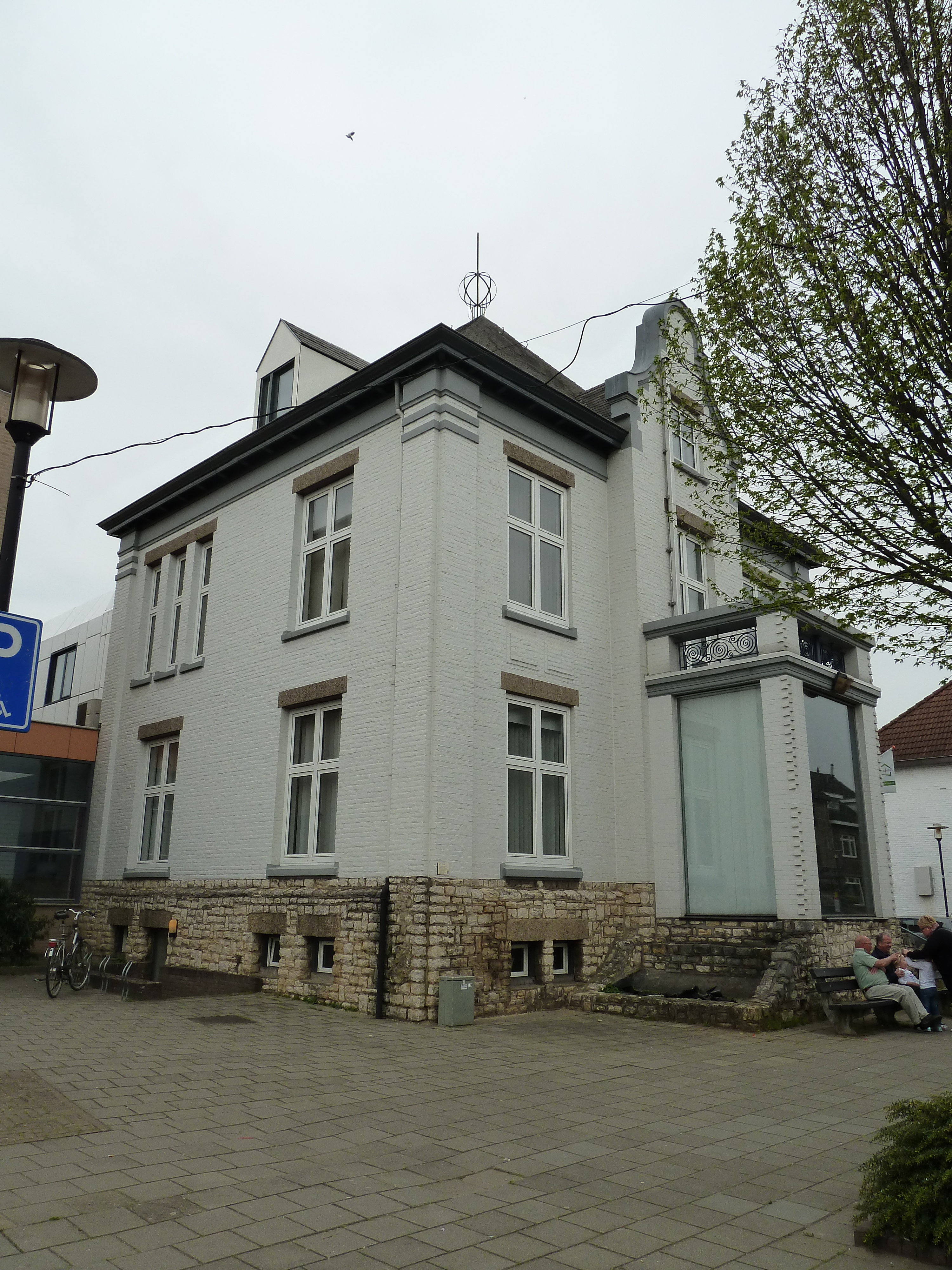 Oude gemeentehuis, Bocholtz, Limburg, Nederland